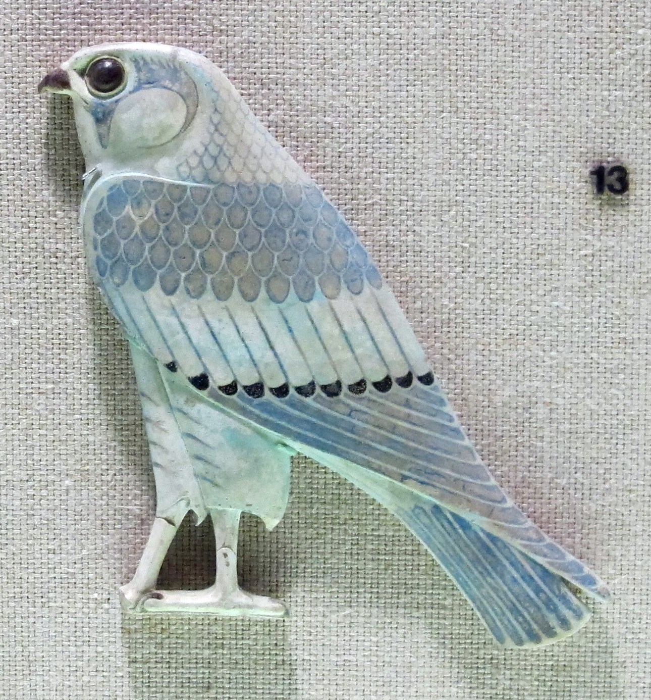 Collezione del Metropolitan Museum, NYC